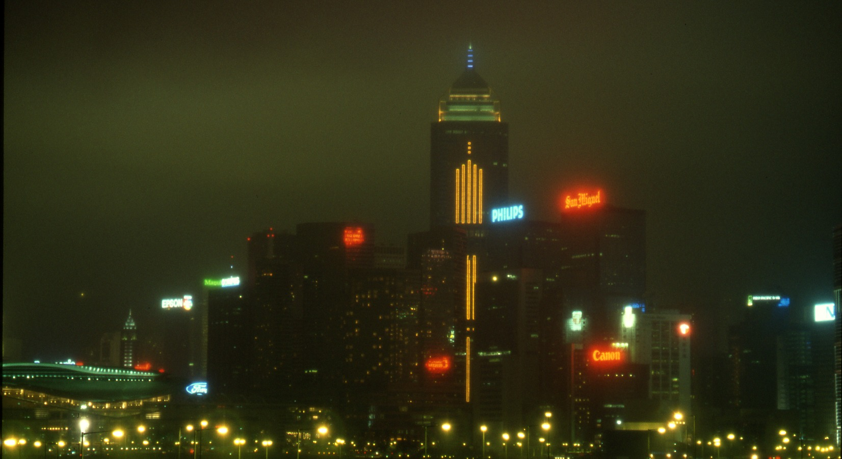 Wan Chai sett från Central i regndis